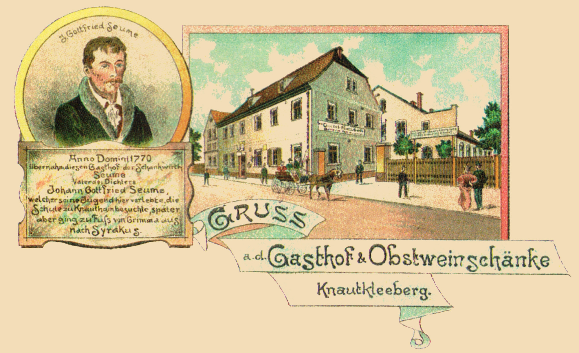 Gasthof und Obstweinschänke Knautkleeberg